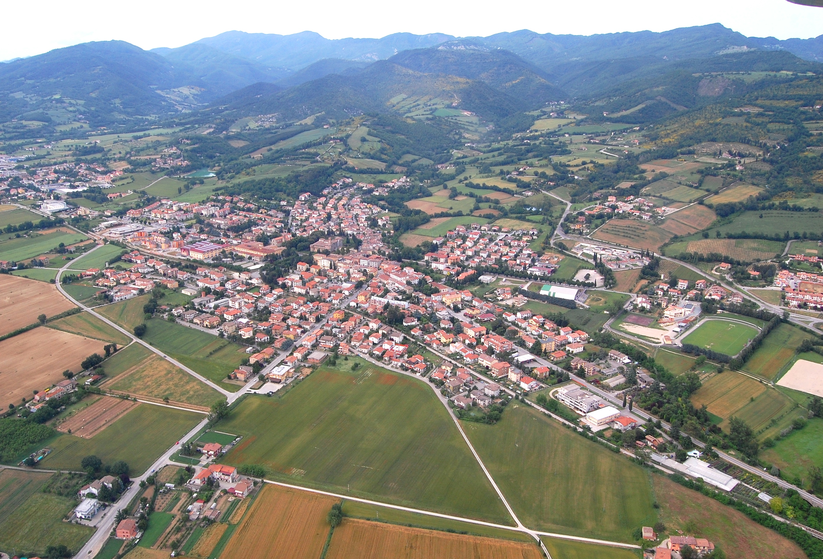 veduta aerea di san giustino - perugia